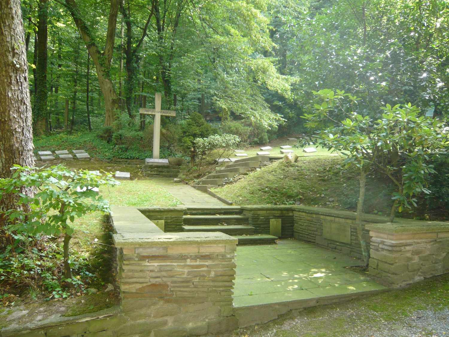 Grabfeld auf dem Friedhof Unterbarmen für die Sendboten der Rheinischen Mission